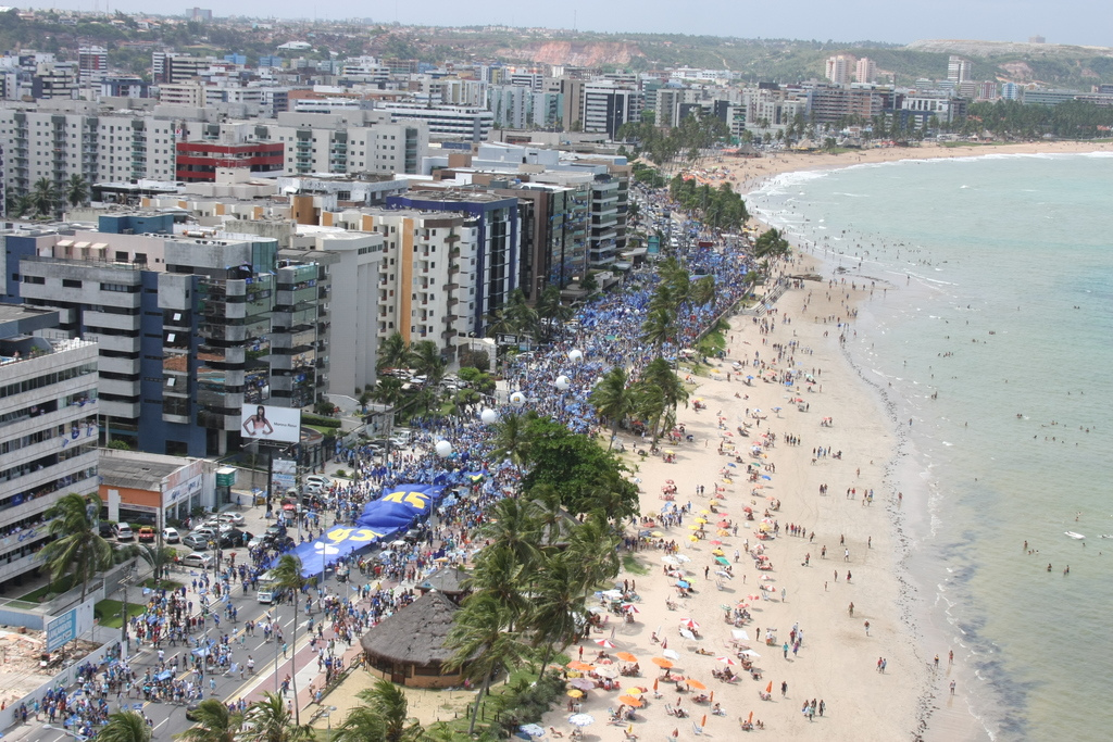 Panorama de Maceió, estado de Alagoas, Brasil.